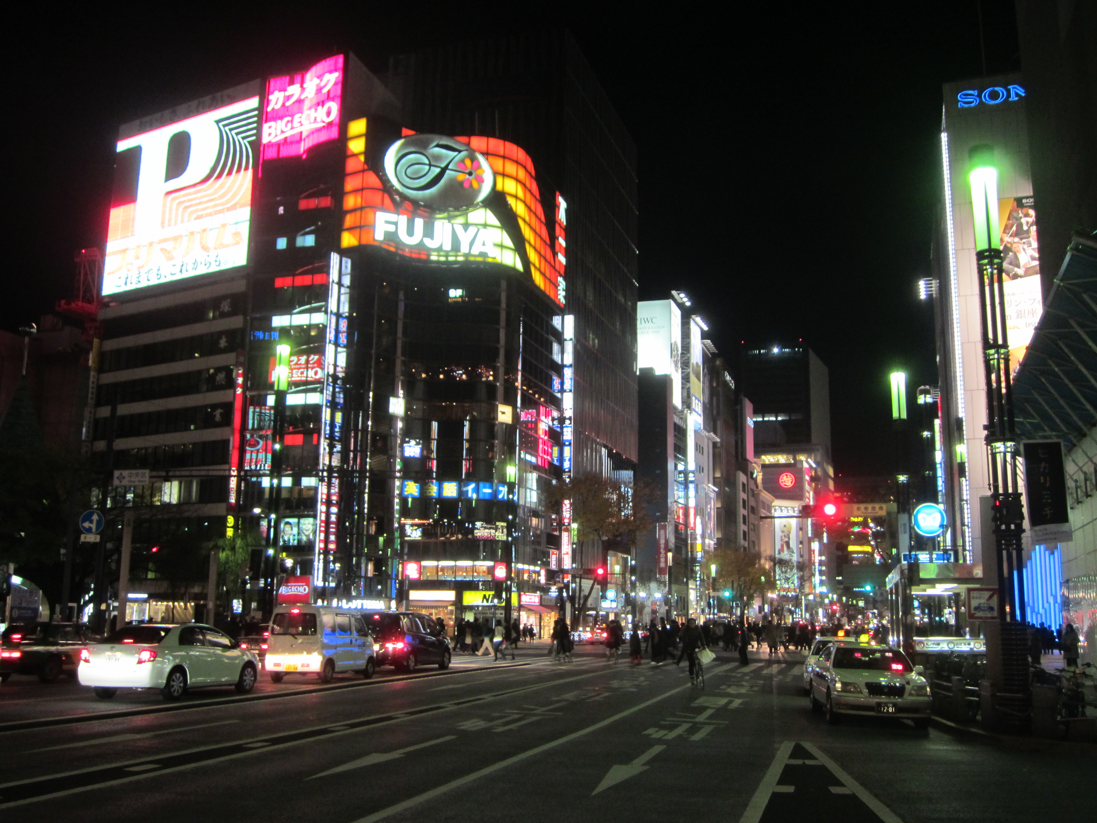 Tokyo Ginza